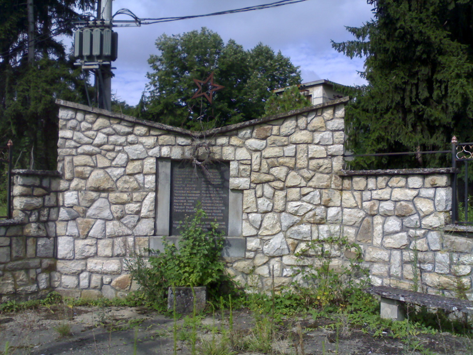 Споменик партизанима у селу Десић код Шапца Licensing